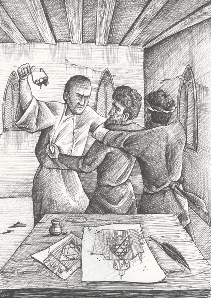 dibujito